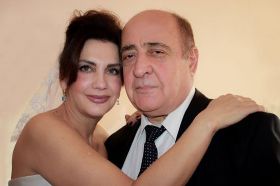 Արմեն Մարությանը կնոջ՝ Ալլա Վարդանյանի հետ